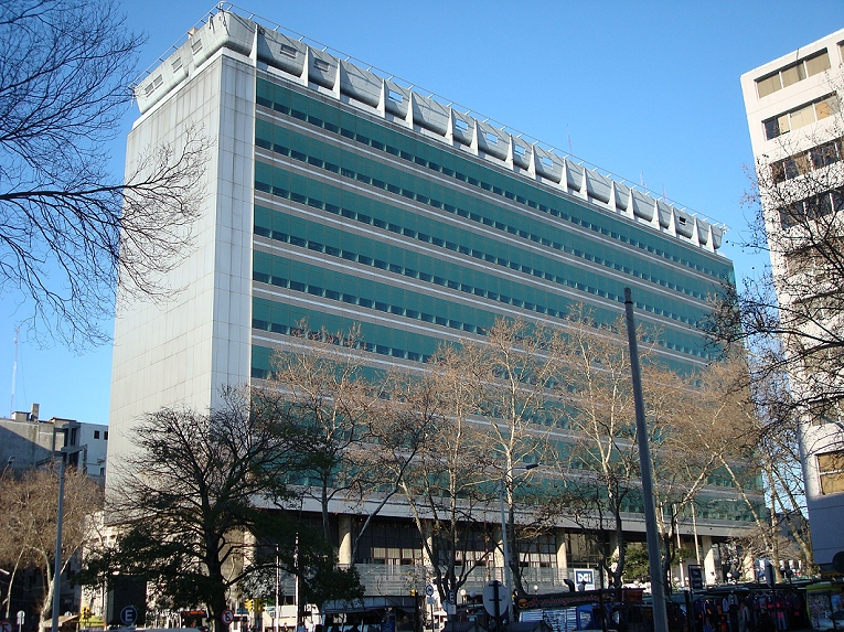 Edificio del Banco Hipotecario de Uruguay, ubicado en el barrio Cordón, Montevideo, Uruguay. En la actualidad aloja también la sede central de la Dirección General Impositiva.